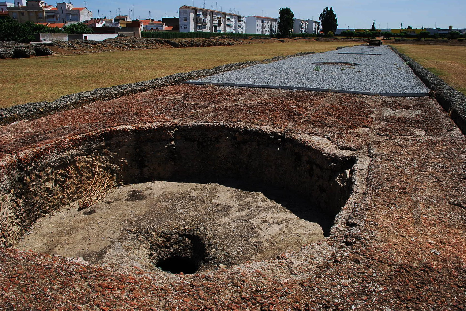 Circo romano de Mérida, provincia de Badajoz (España).